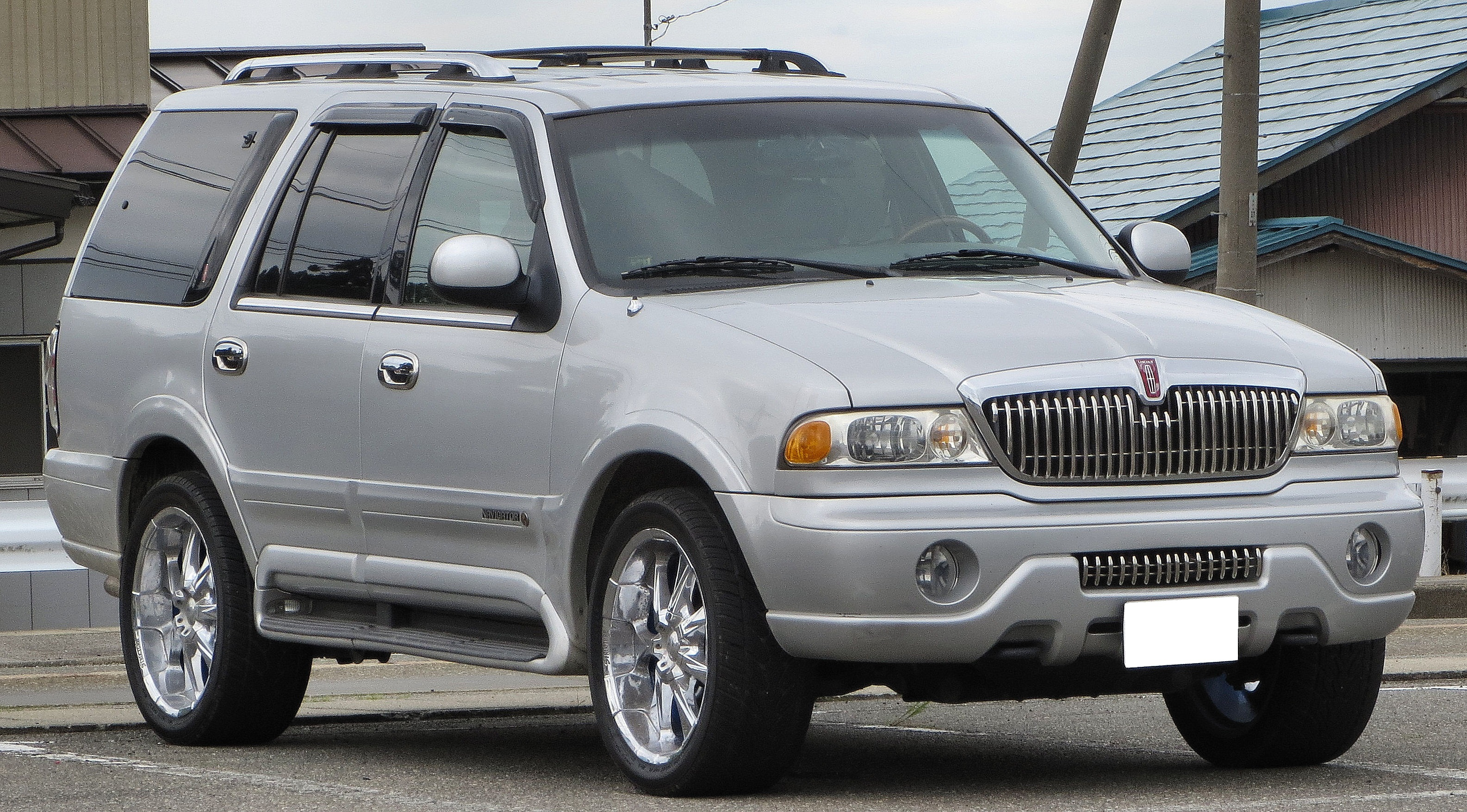 リンカーン・ナビゲーター